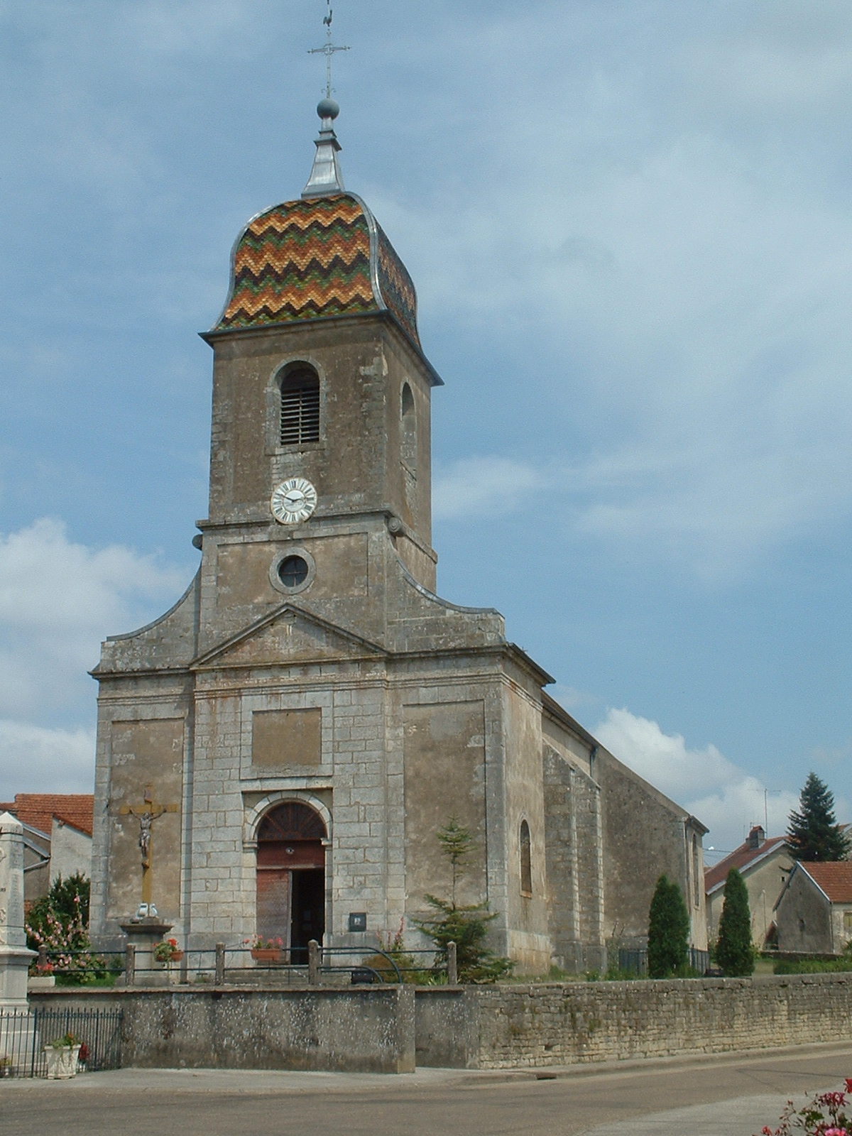 église de Roche-et-Raucourt (Haute-Saône, France)